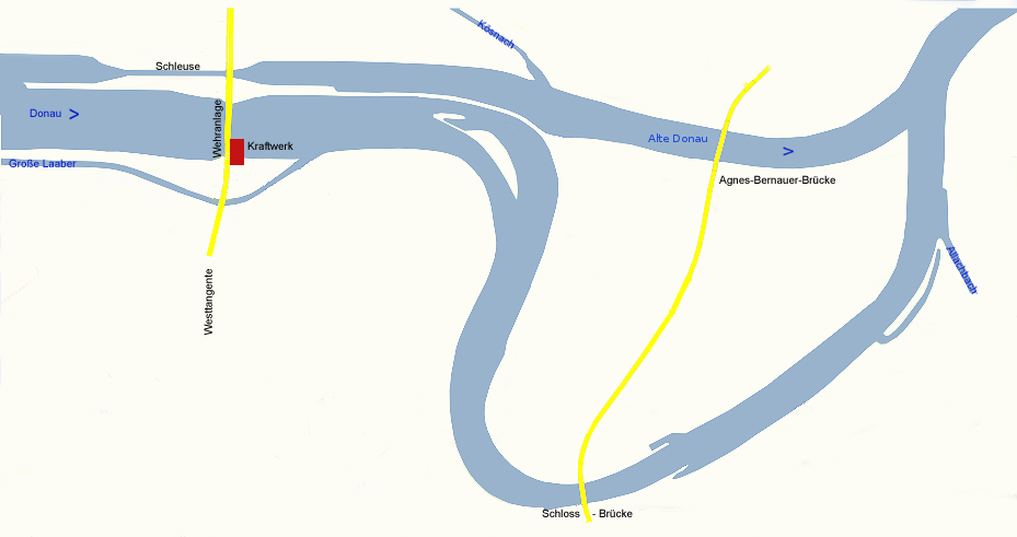 Schema zum Verlauf der Donau in Straubing mit Staustufe